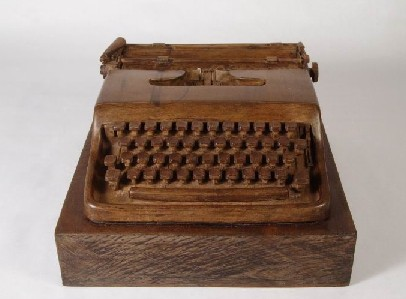 Talla de fusta, Josep Maria Codina Corona